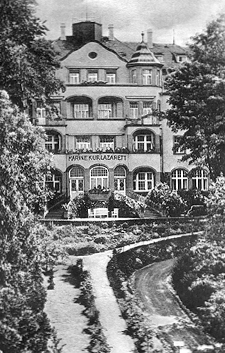 Marinekurlazarett Bad Kissingen im Jahr 1941